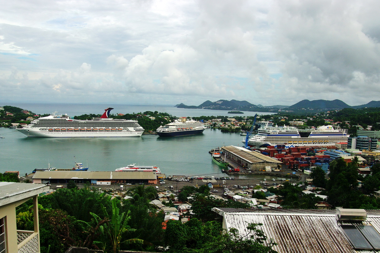 Hafen von Castries mit Kreuzfahrtschiffen